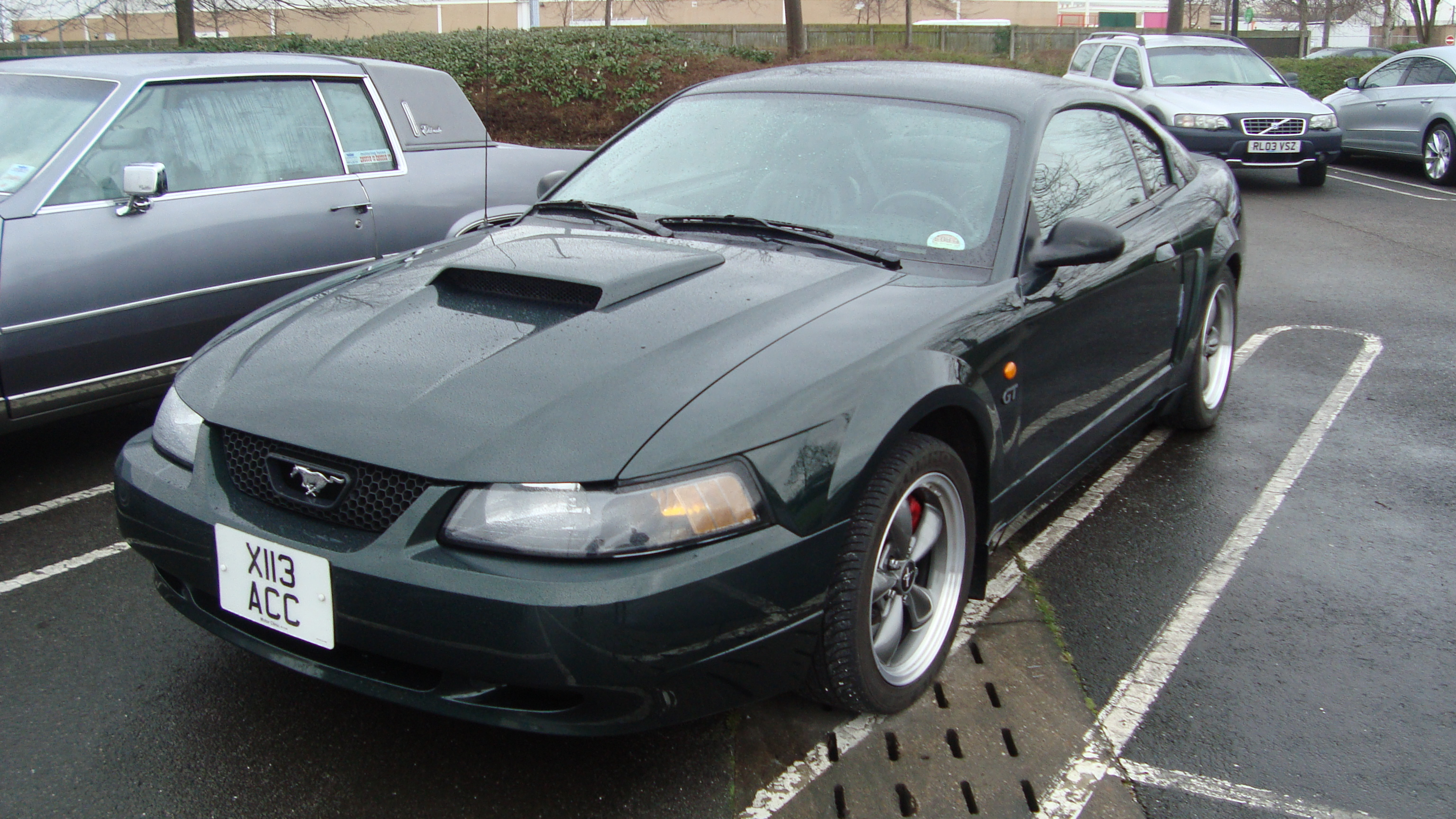 2001 Ford Mustang Bullitt